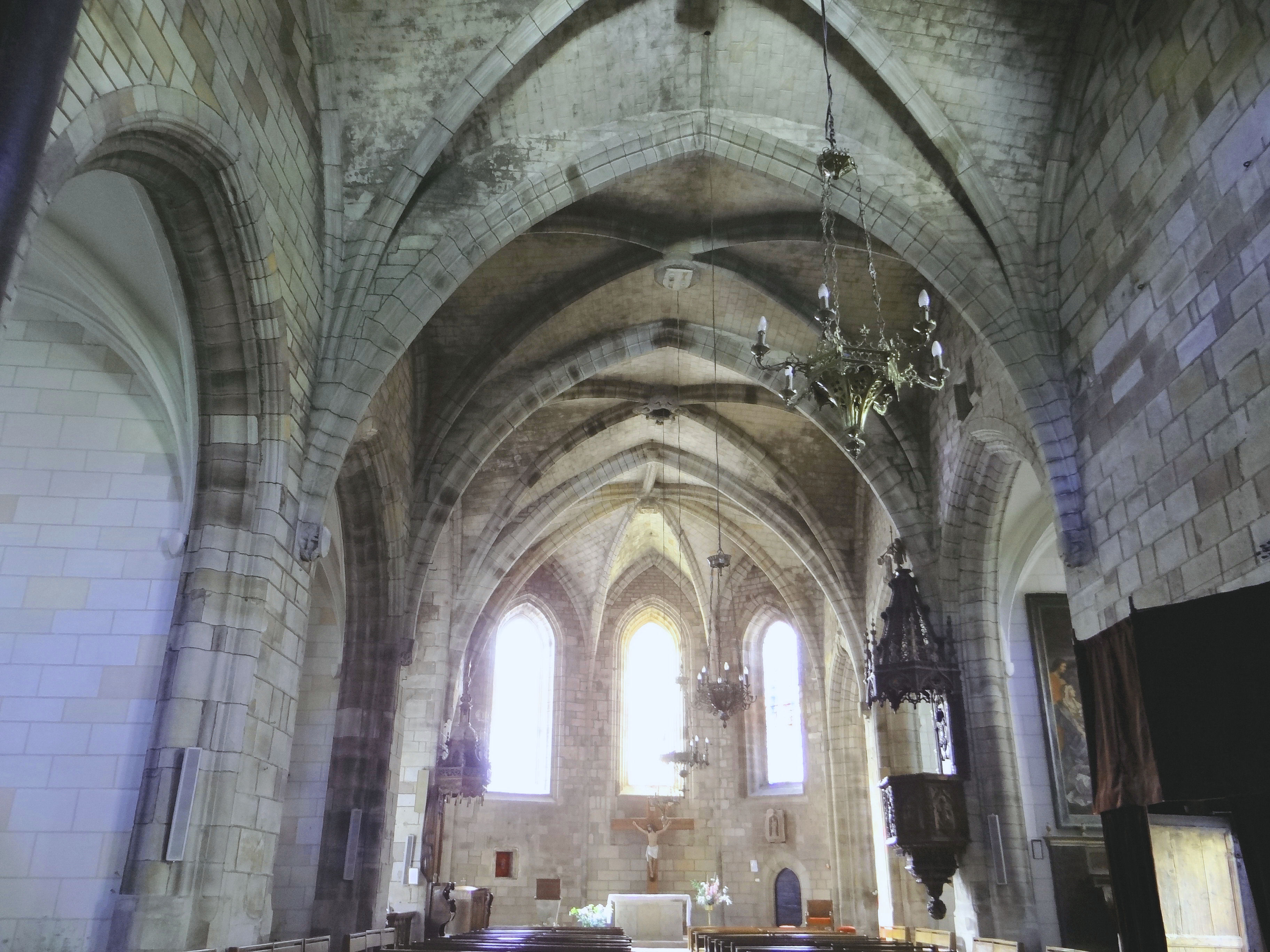 Saint-Sernin-sur-Rance - Collégiale Saint-Sernin - Nef